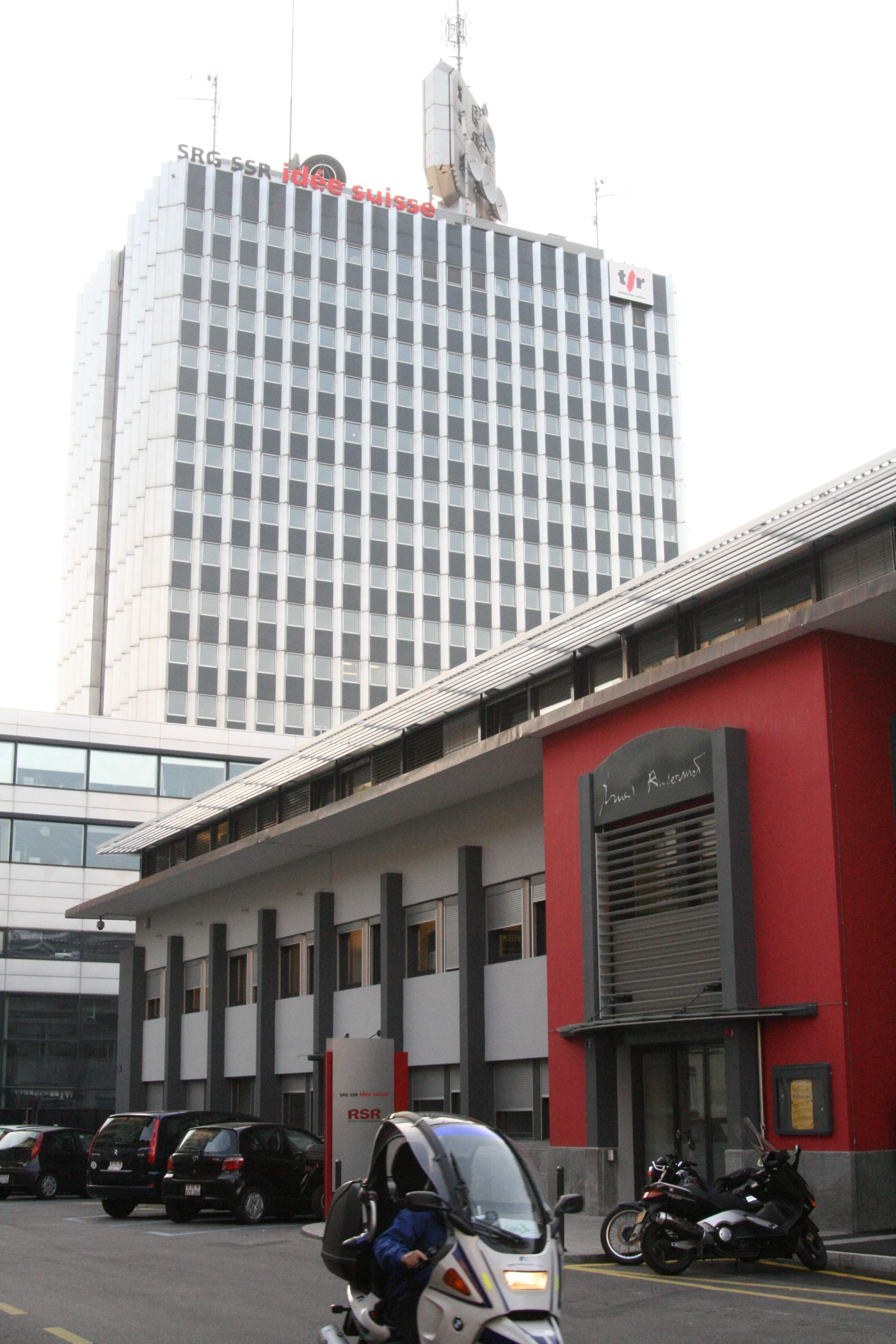 Immeuble de la télévision suisse romande Quai Ernest Ansermet à Genève (photo prise depuis le passage de la radio)